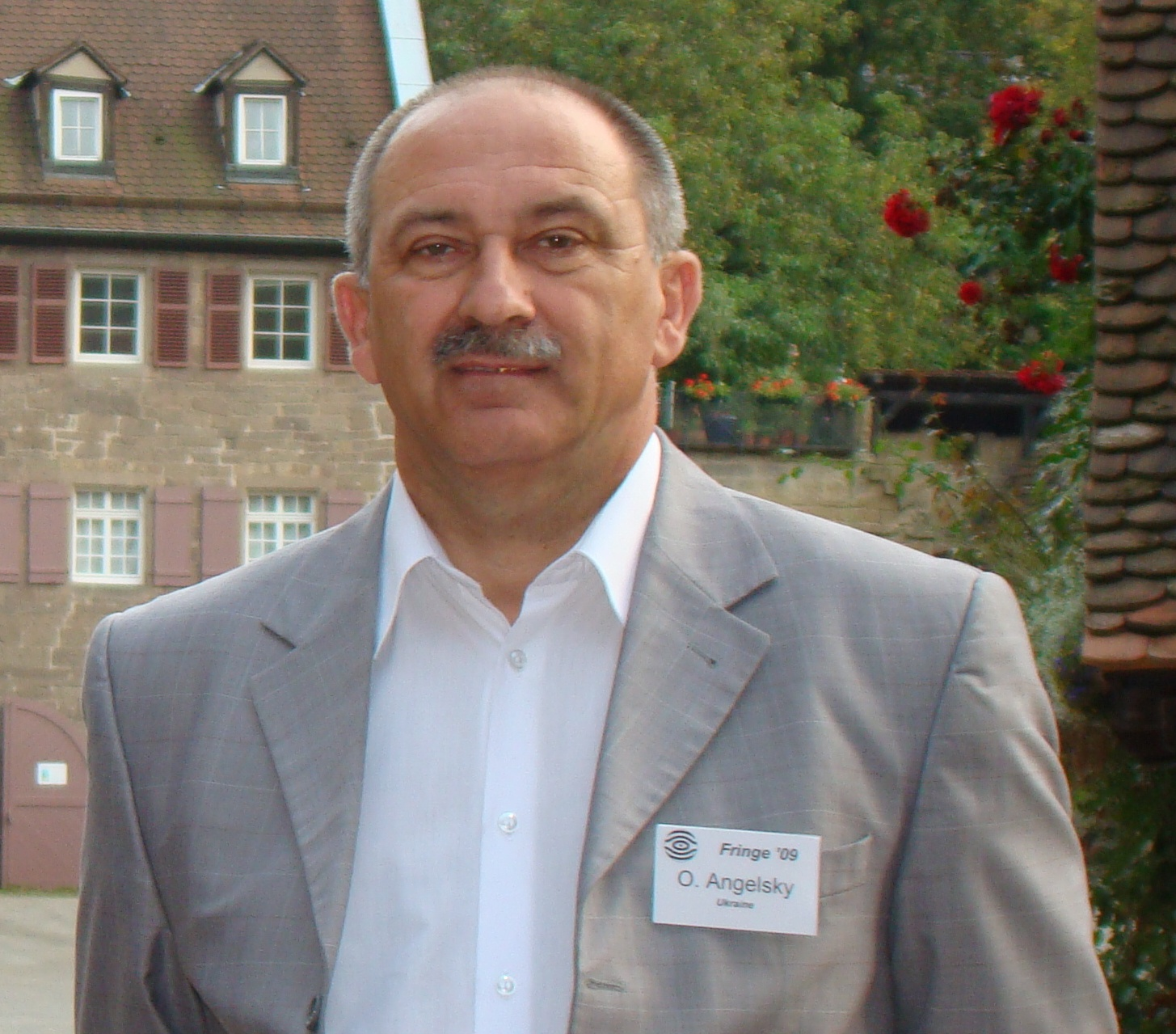 Ангельський Олег В'ячеславович — академік АН вищої школи України